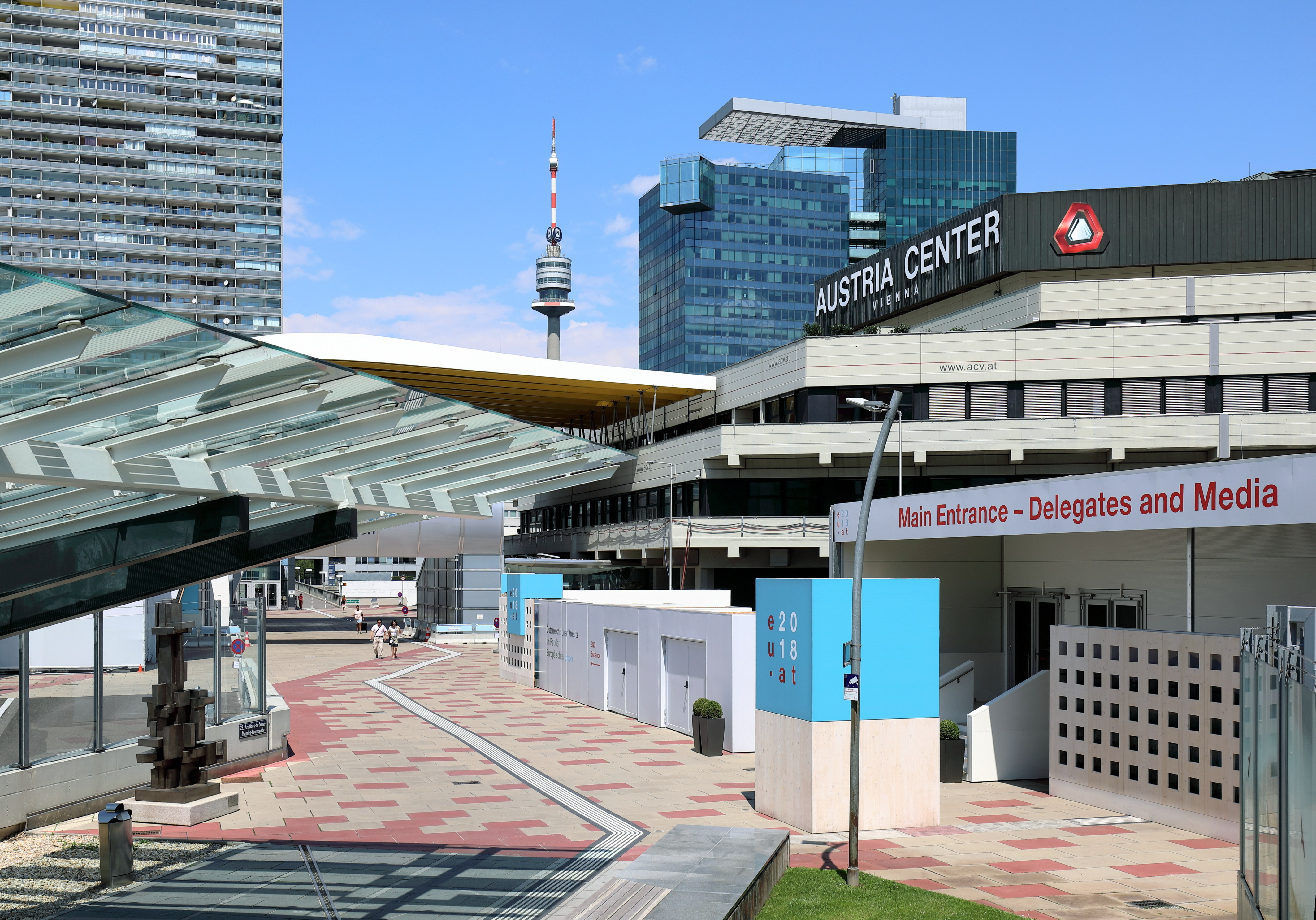 Der für den EU-Ratsvorsitz 2018 mit temporären Bauten adaptierte Vorplatz des Austria Center Vienna im 22. Wiener Gemeindebezirk Donaustadt.